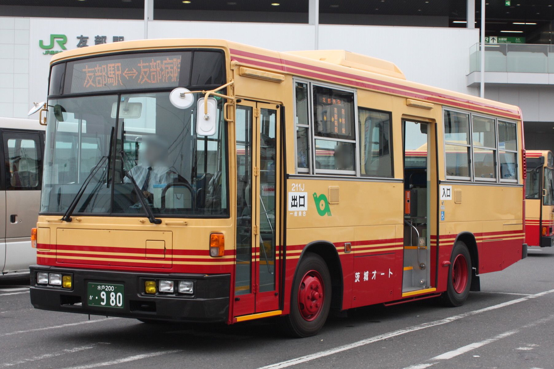 茨城オート 水戸200か･980 KC-RM211ESN 友部駅南口にて 2009年7月に西武バスからやってきた1台